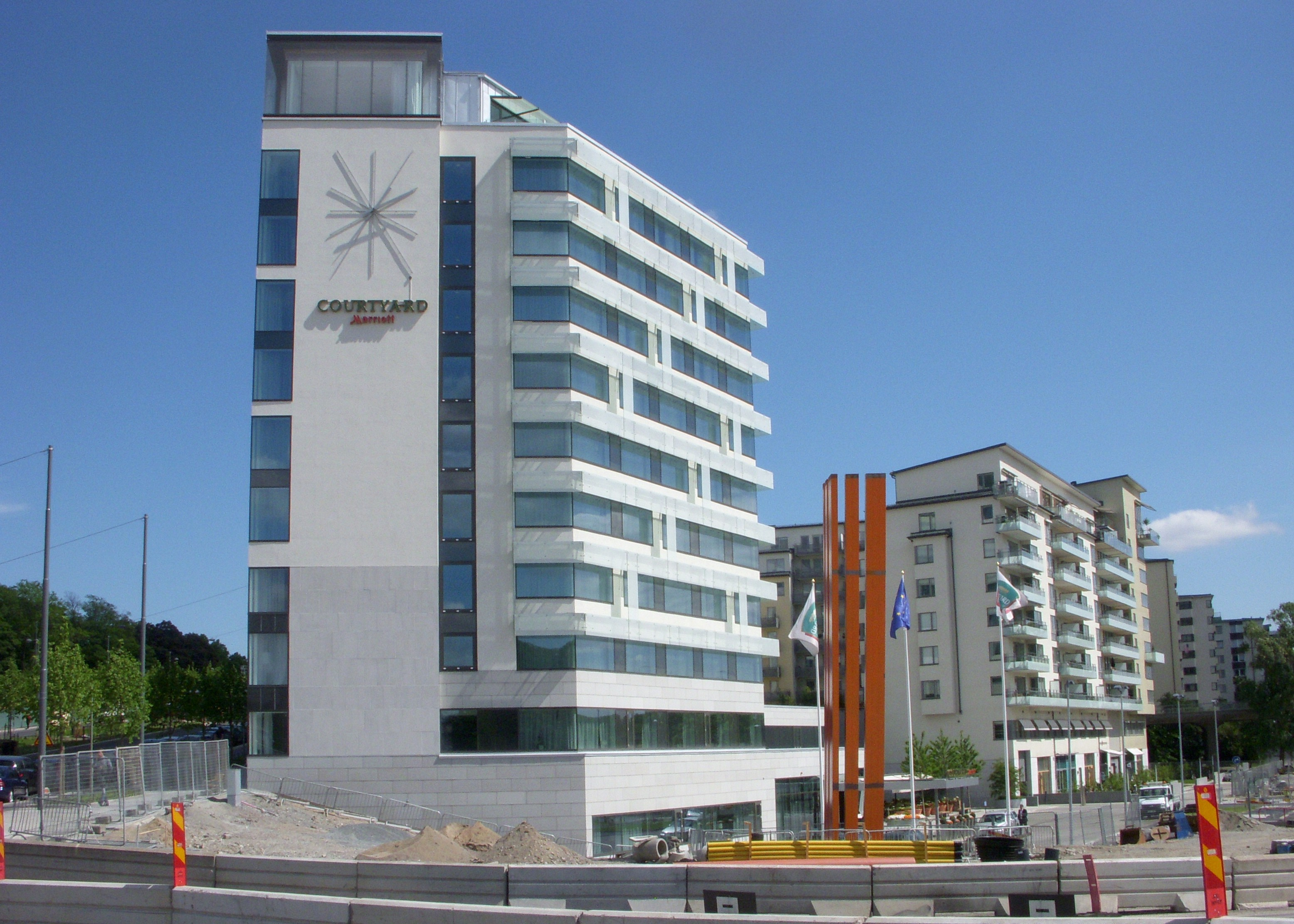 Kvarteret Snöflingan med Courtyard Stockholm (vänster) och nya bostäder. Arkitekter Reflex arkitetekter (hotellet) och ÅWL arkitekter (bostäderna).